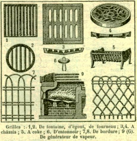 Différentes grilles de fermetures employées dans le bâtiment.